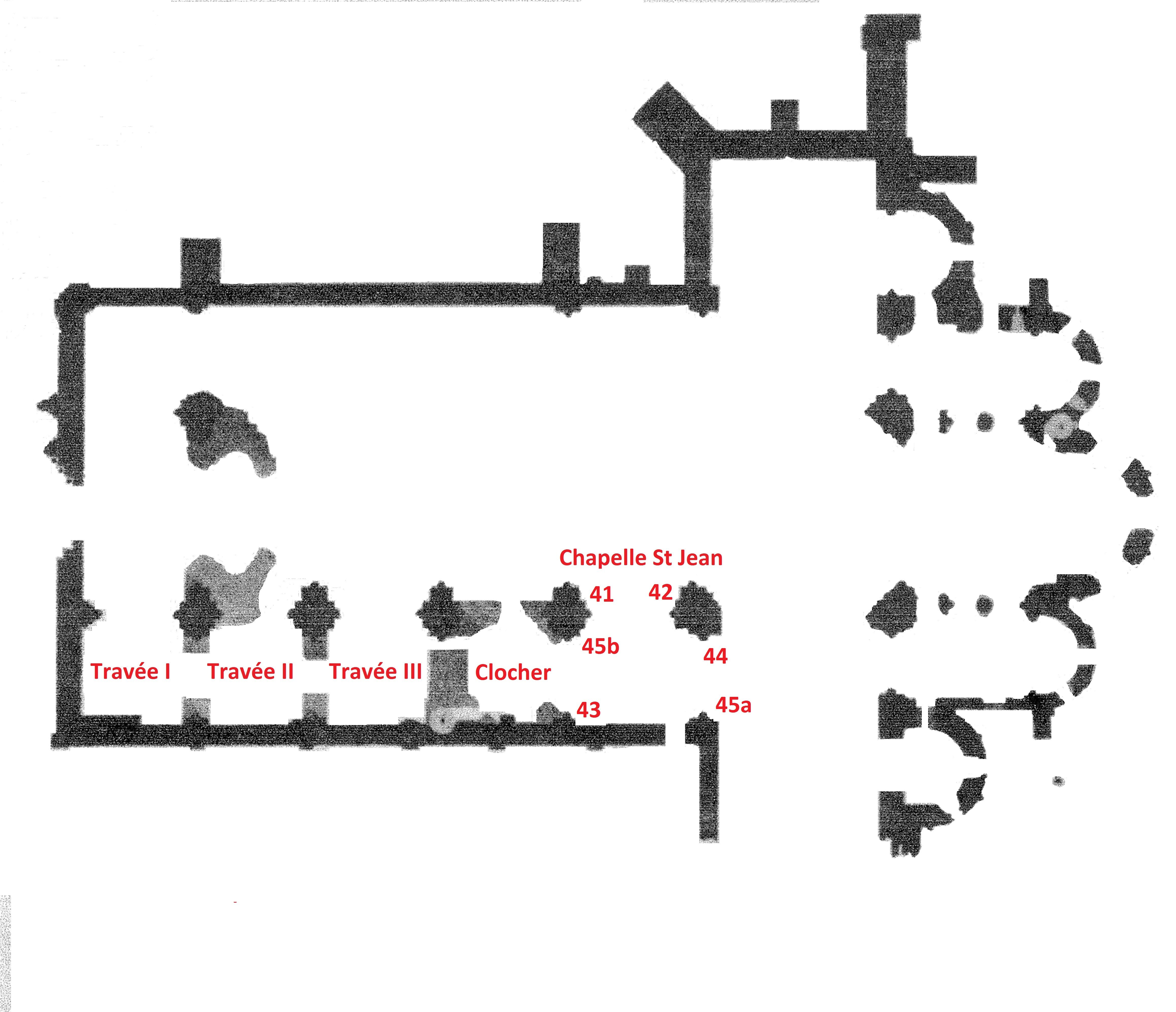 Emplacements des sculptures abbaye de la Sauve-Majeure (Gironde)